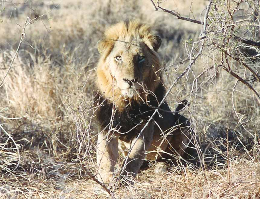 Léiw 2 am Krügerpark